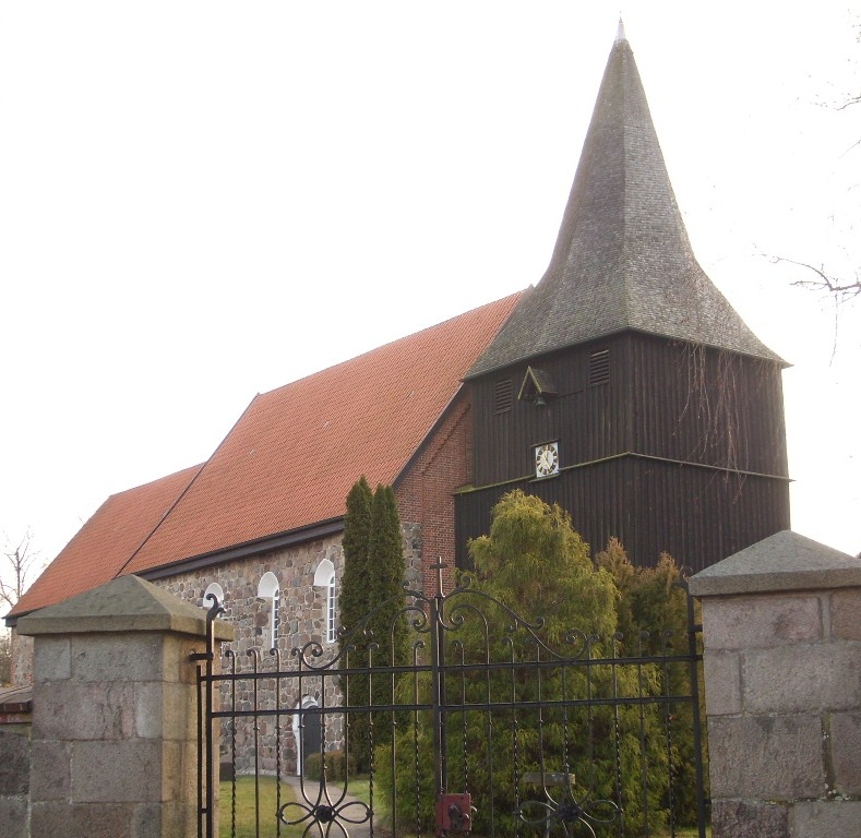 Marienkirche in Gudow, Kreis Herzogtum Lauenburg. Feldsteinkirche der Übergangszeit von der Romanik zur Gotik mit gotischem Choranbau. Hölzerner Glockenturm aus späterer Zeit.